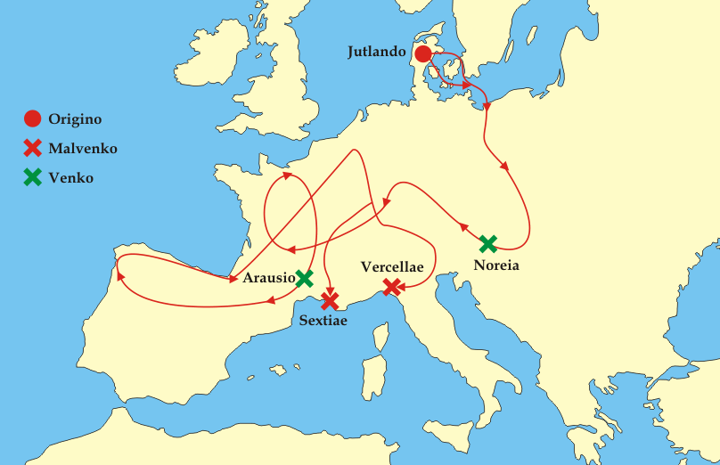 Origino: :de:Bild:Kimbern Teutonen Wanderung.png